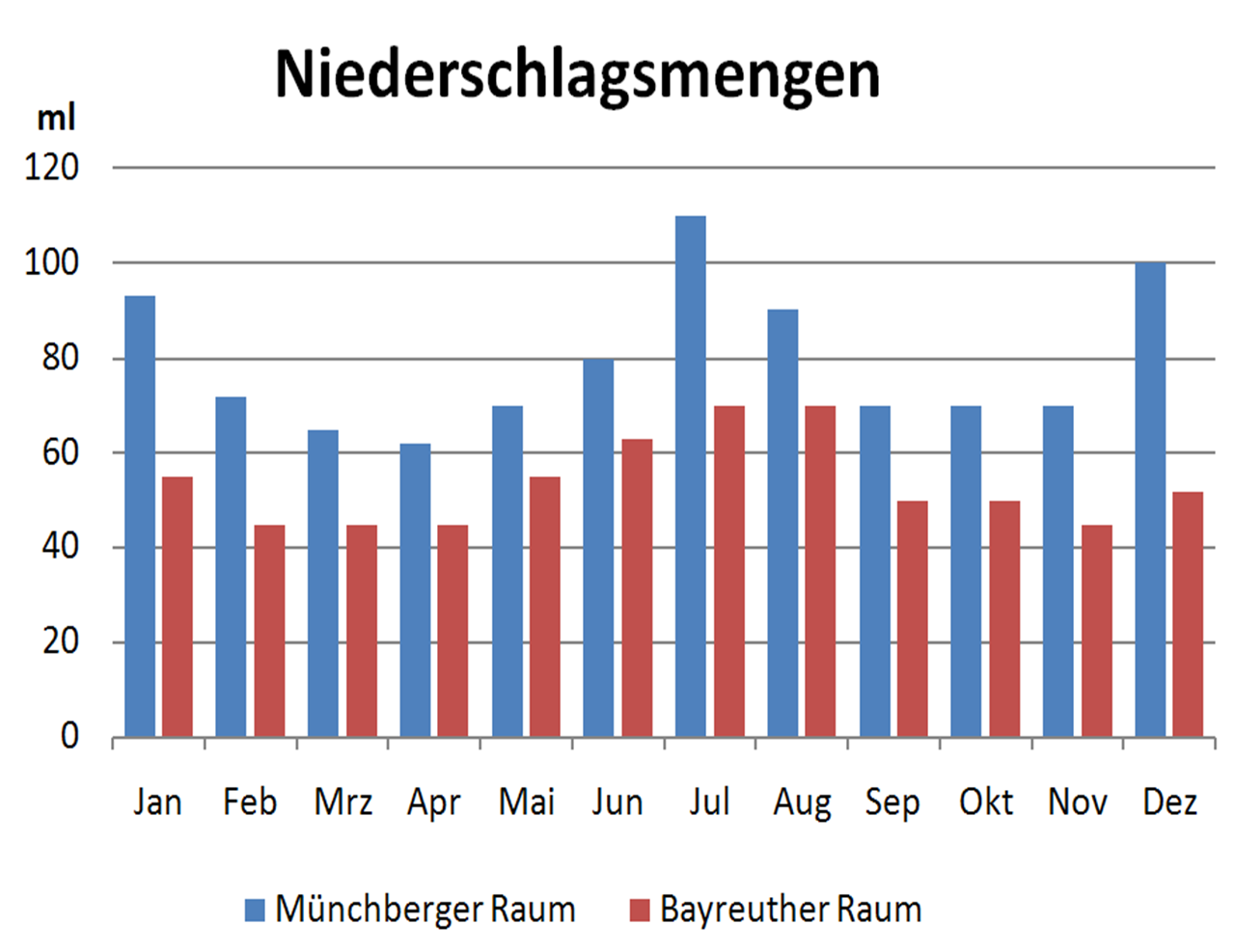 Diagramm der Niederschläge im Münchberger, und Bayreuther Raum